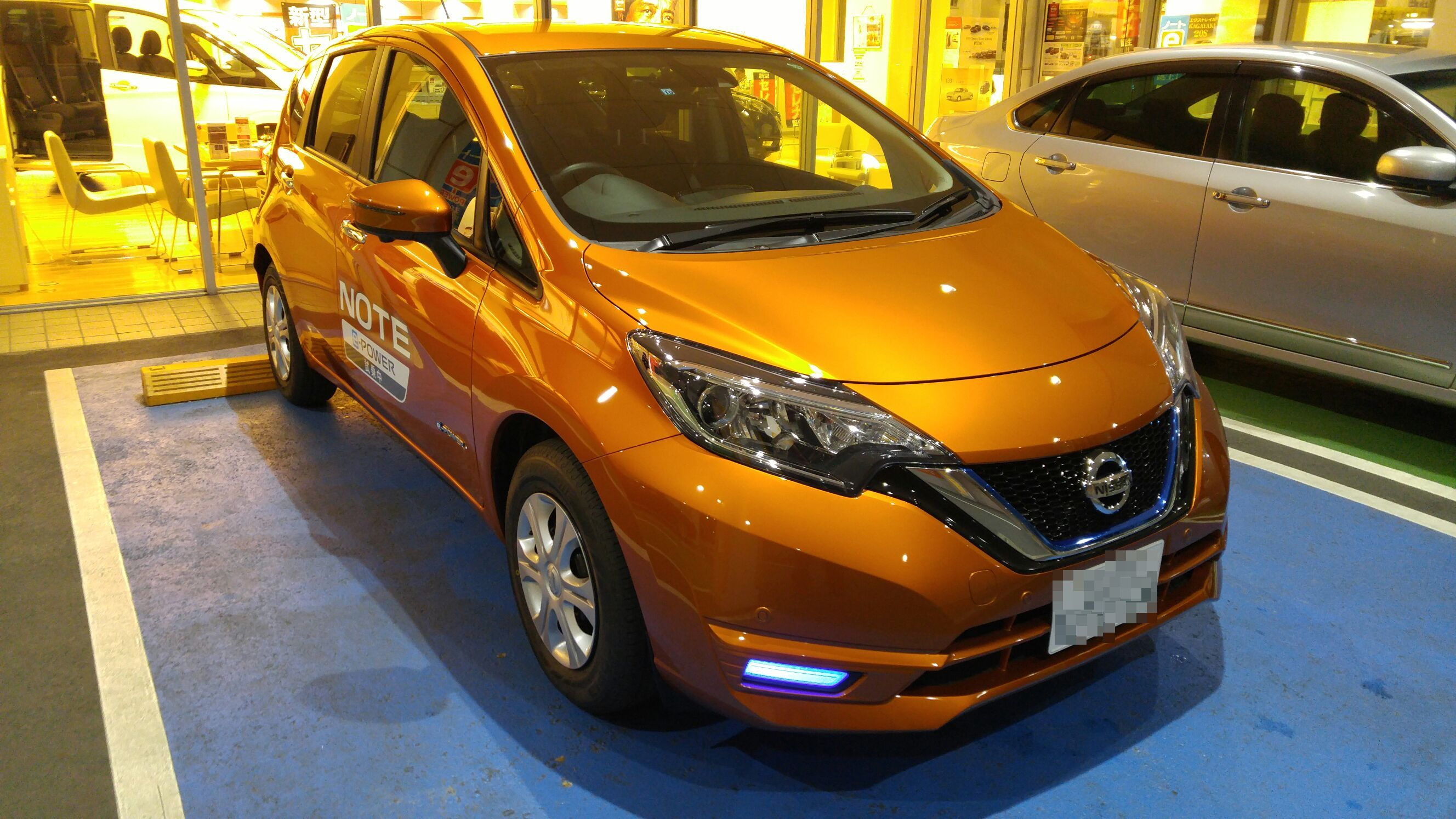 日産・ノート